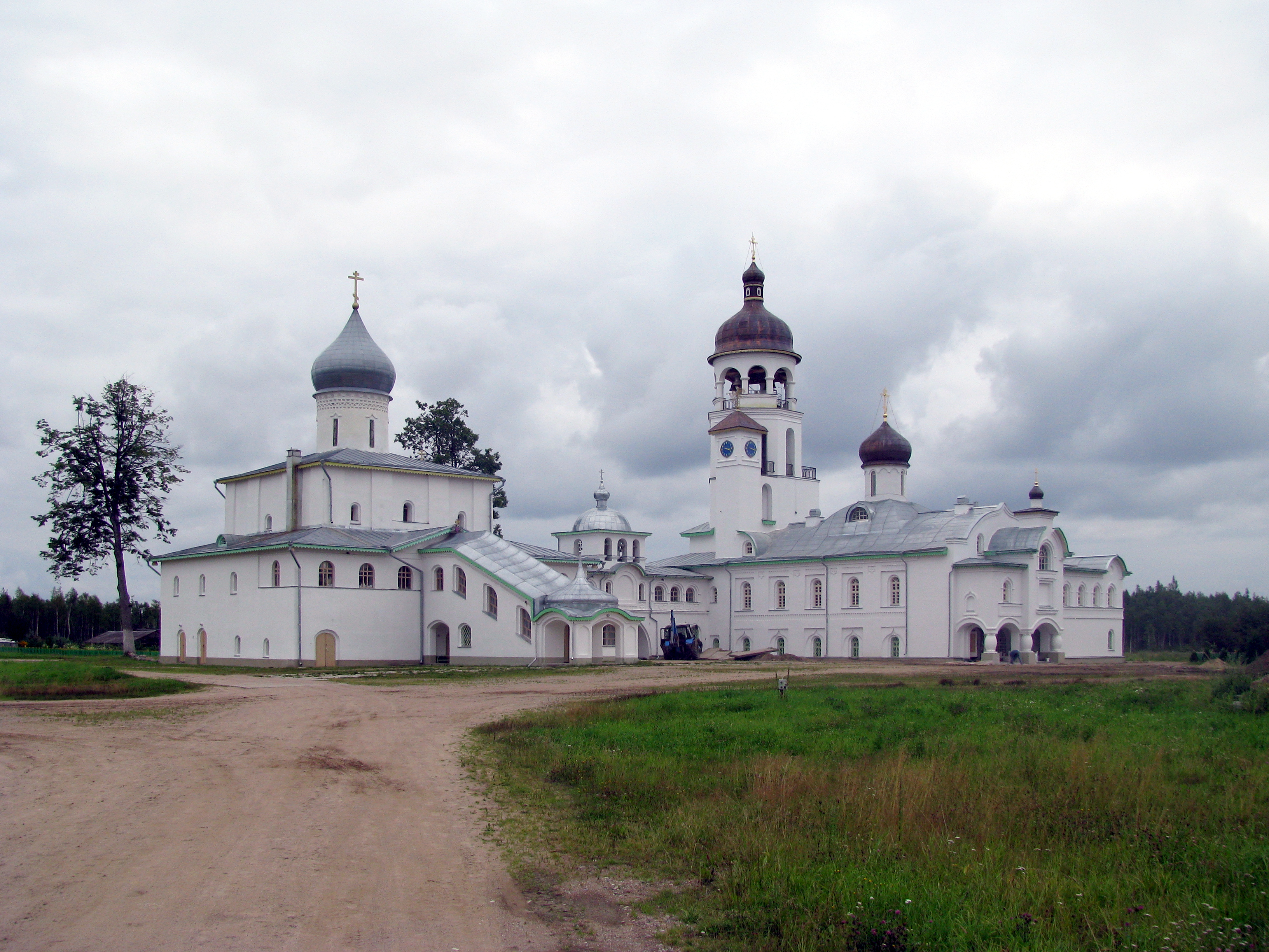 Крыпецкий Иоанно-Богословский монастырь